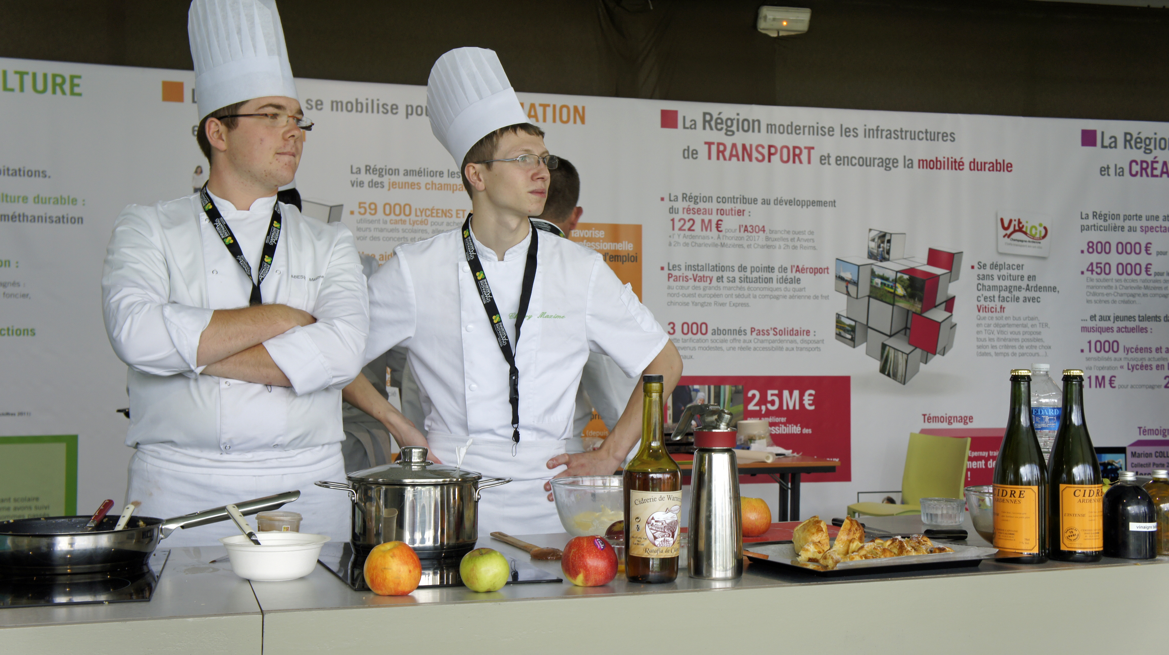 Un CFA sur le stand de la région présenté lors de la foire de Châlons de 2012.